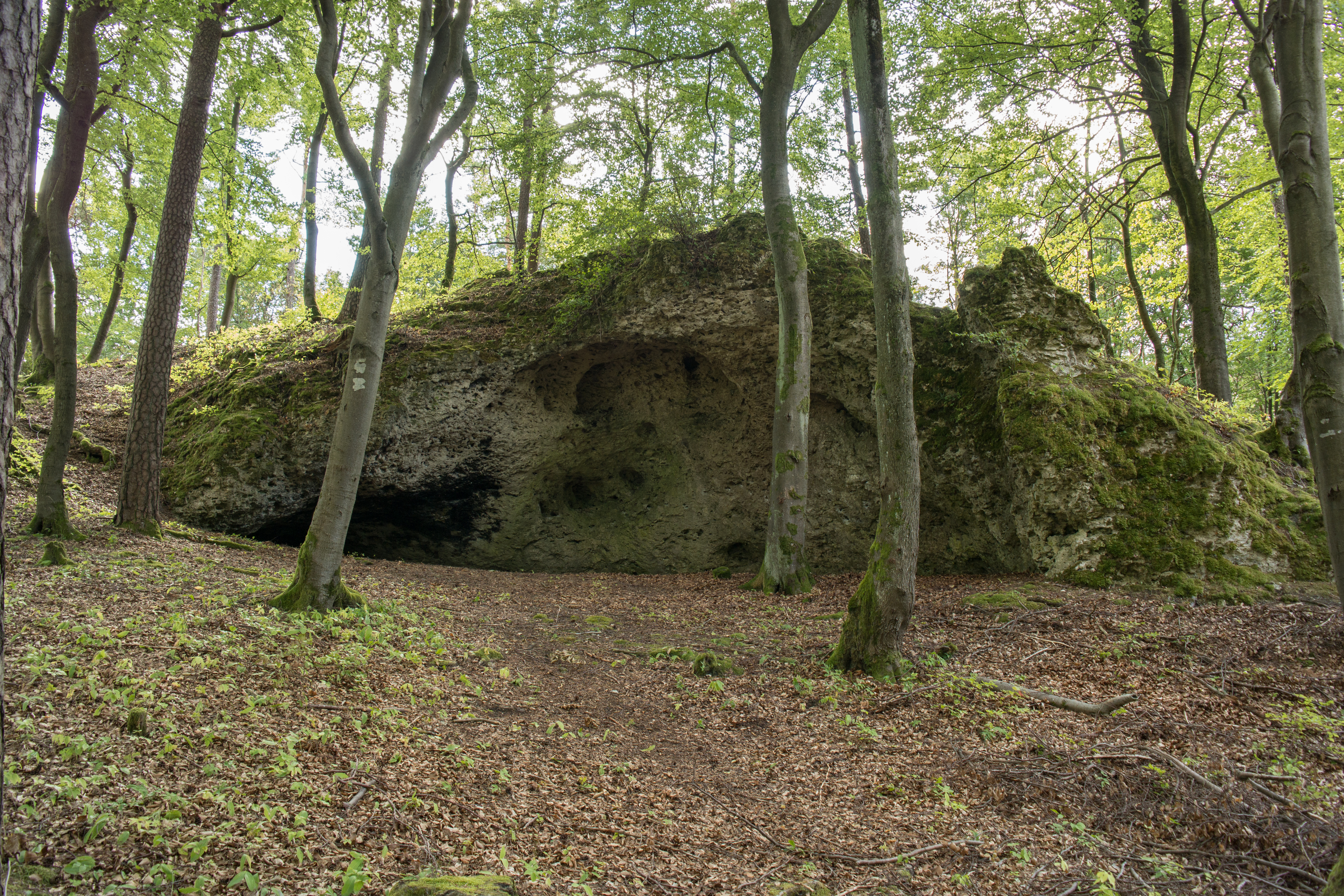 Ansicht der Höhle Alter Keller